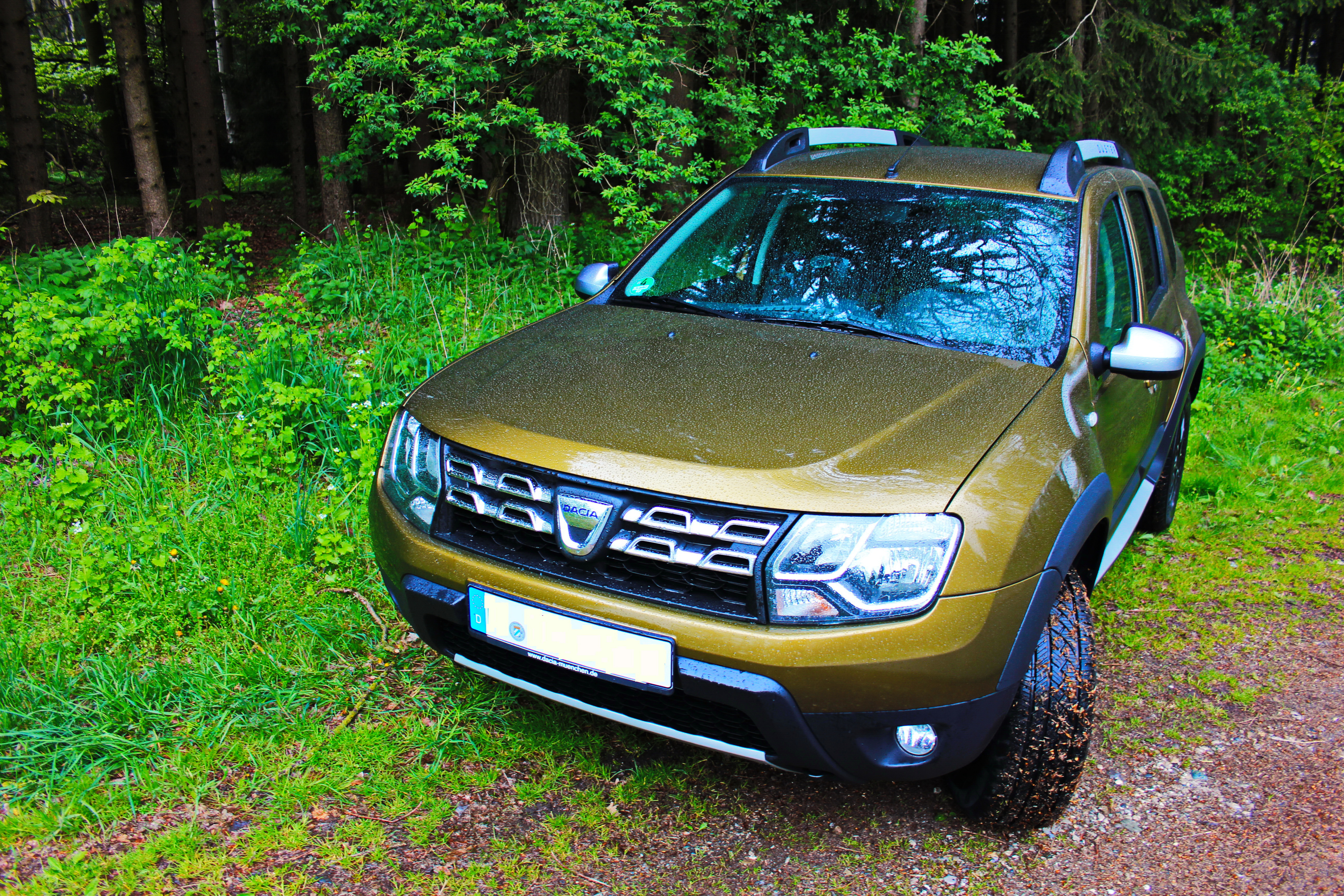 Dacia Duster Urban Explorer Altai Grün im Regen